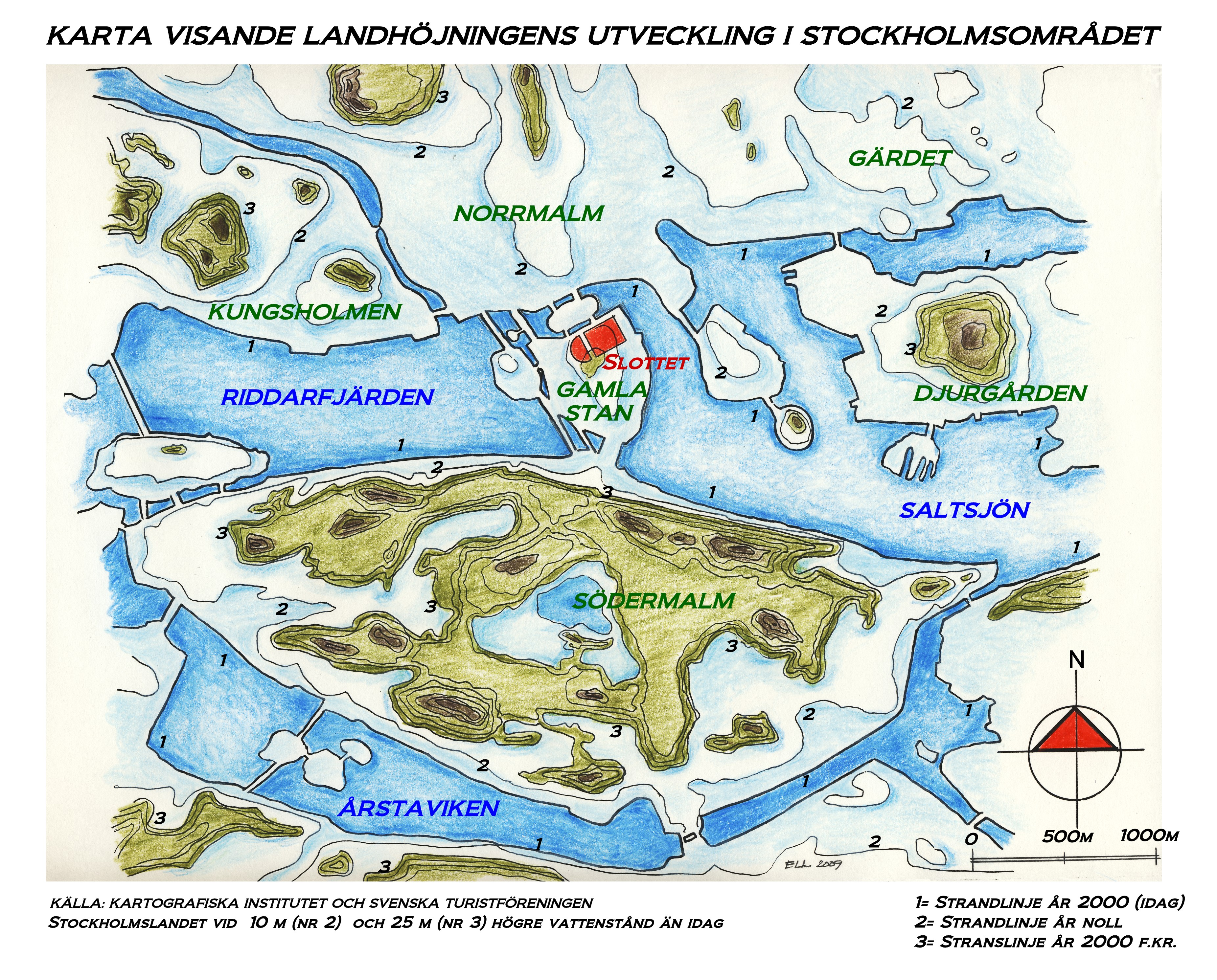 Postglaciala landhöjningen i Stockholmstrakten